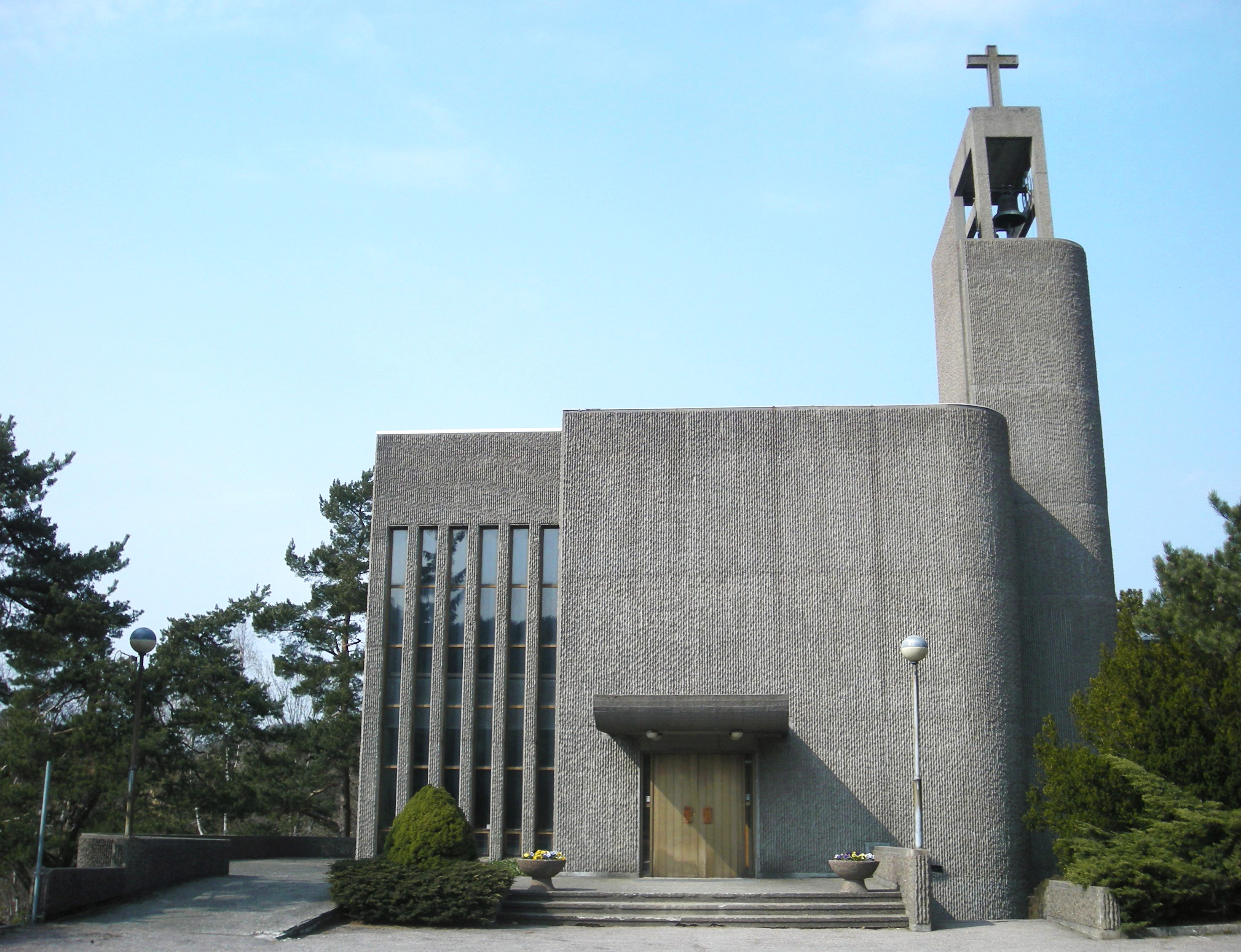 Grim kirke